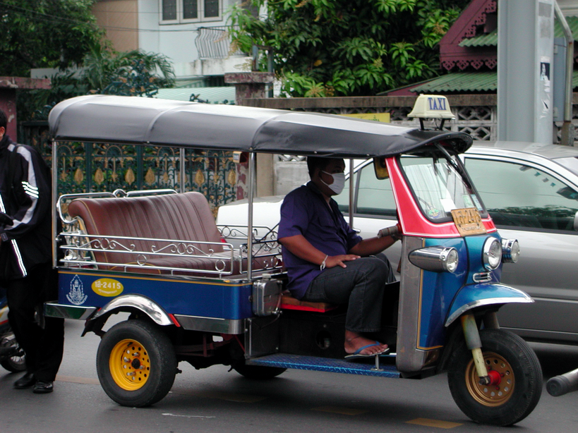 Waerth 30 aug 2004 04:33 (CEST)